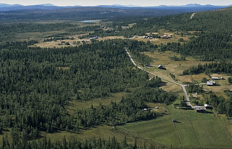 Motiv: Högvålen Nyckelord: Flygbilder, Riksintressen Kategori: Jordbruksby Högvålen